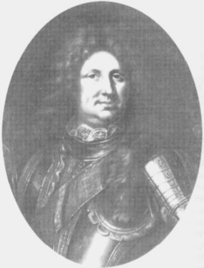 Markgraf Friedrich VII. Magnus von Baden-Durlach (Öl-Gemälde 1775), wird der Werkstatt von Johann Ludwig Kisling zugeschrieben